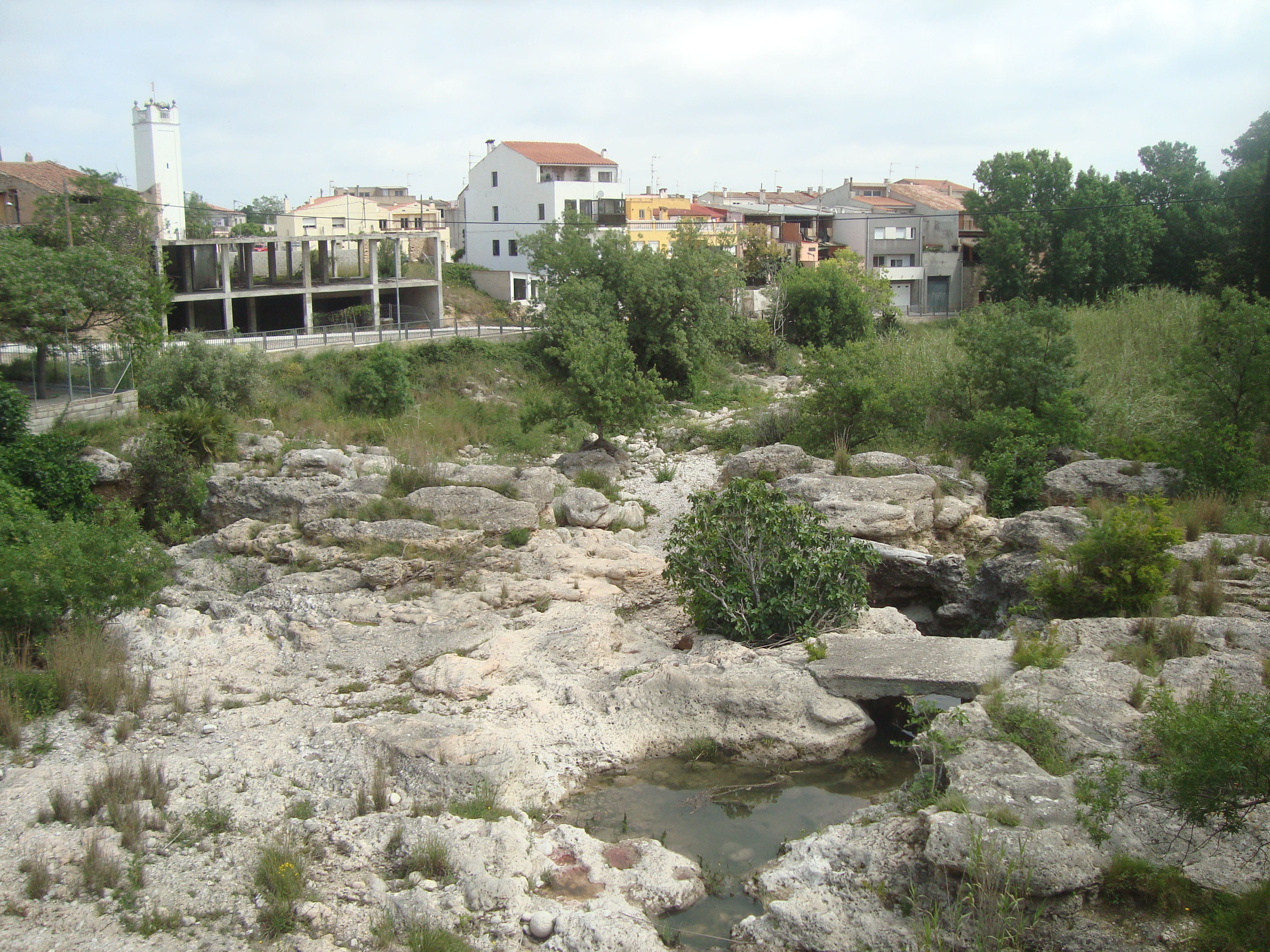 El riu Sénia al seu pas per el Castell i per Sant Rafael del Riu ( Sant Rafel del Maestrat)